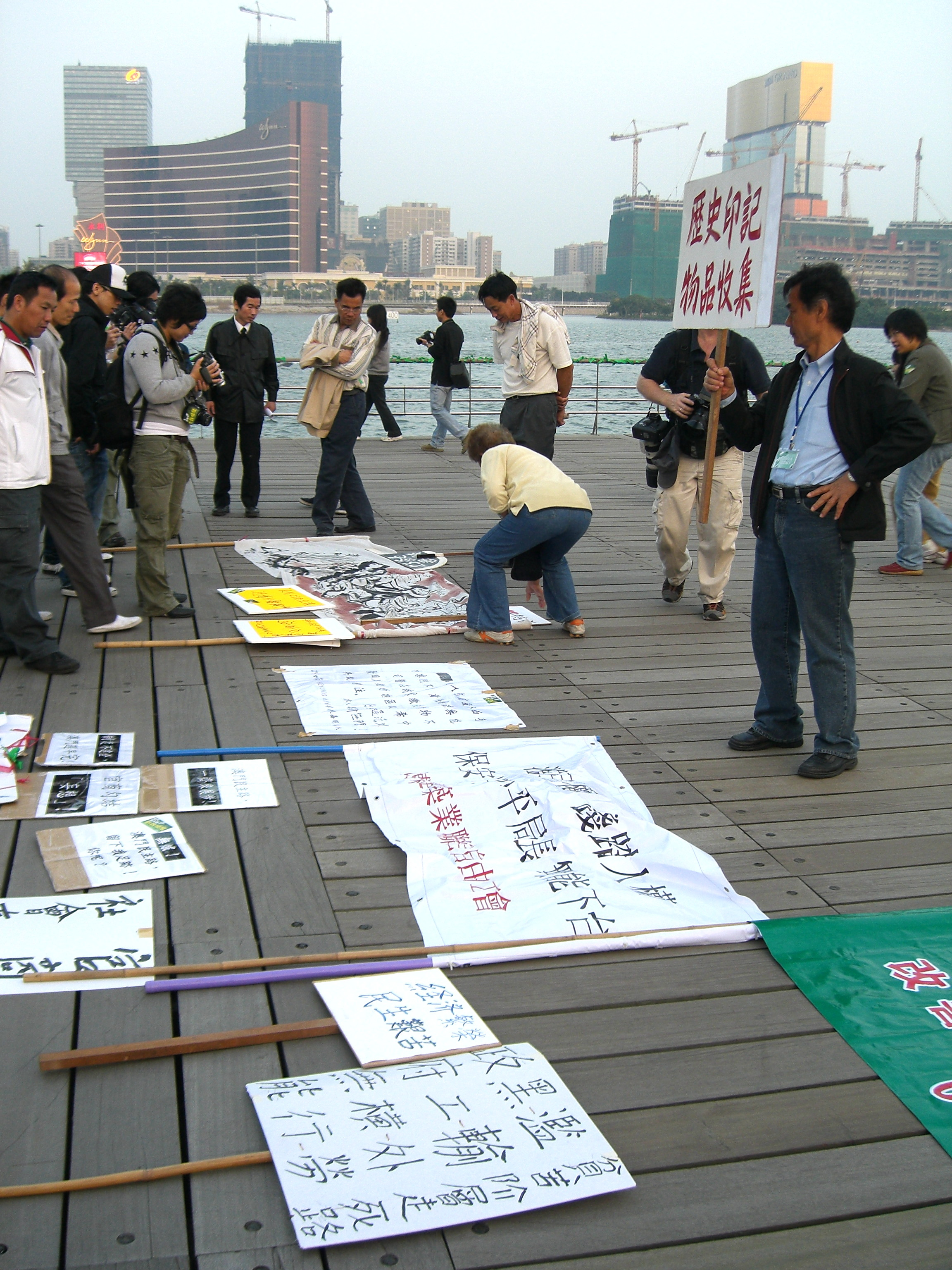 Macau 2007.12.20 demonstration